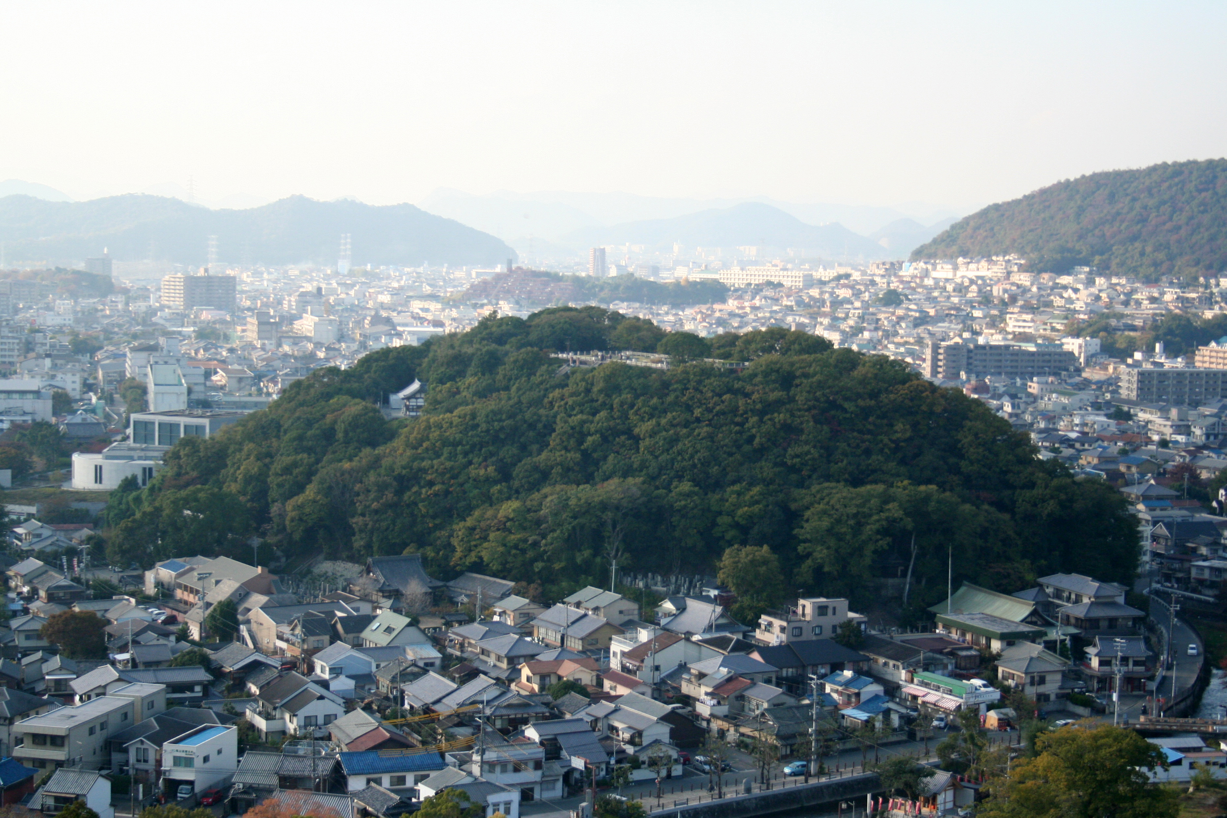 2009年秋の姫路城。 男山。